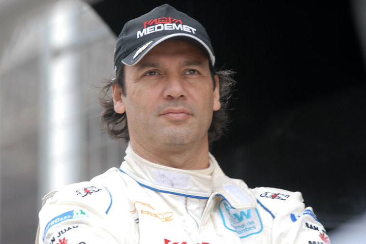 Henry Rubén Antonio Martin, piloto argentino de automovilismo de velocidad. Campeón argentino de TC 2000 (1997) y Top Race Series (2013)